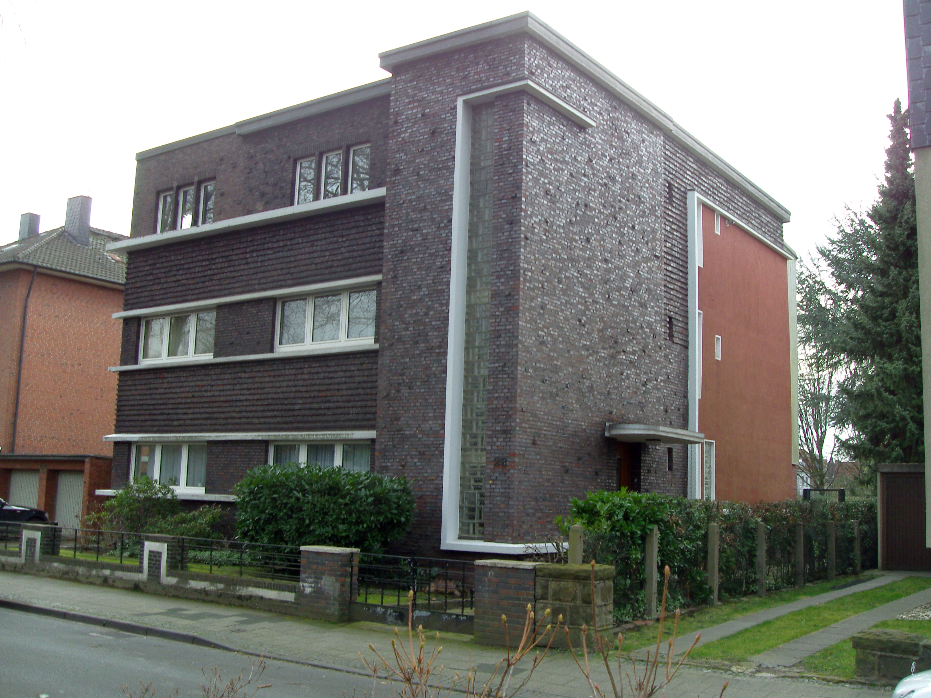 Reichsstraße 28 in Herne-Eickel This is the photograph of an architectural monument. It is part of the list of cultural monuments of Herne, no. 647